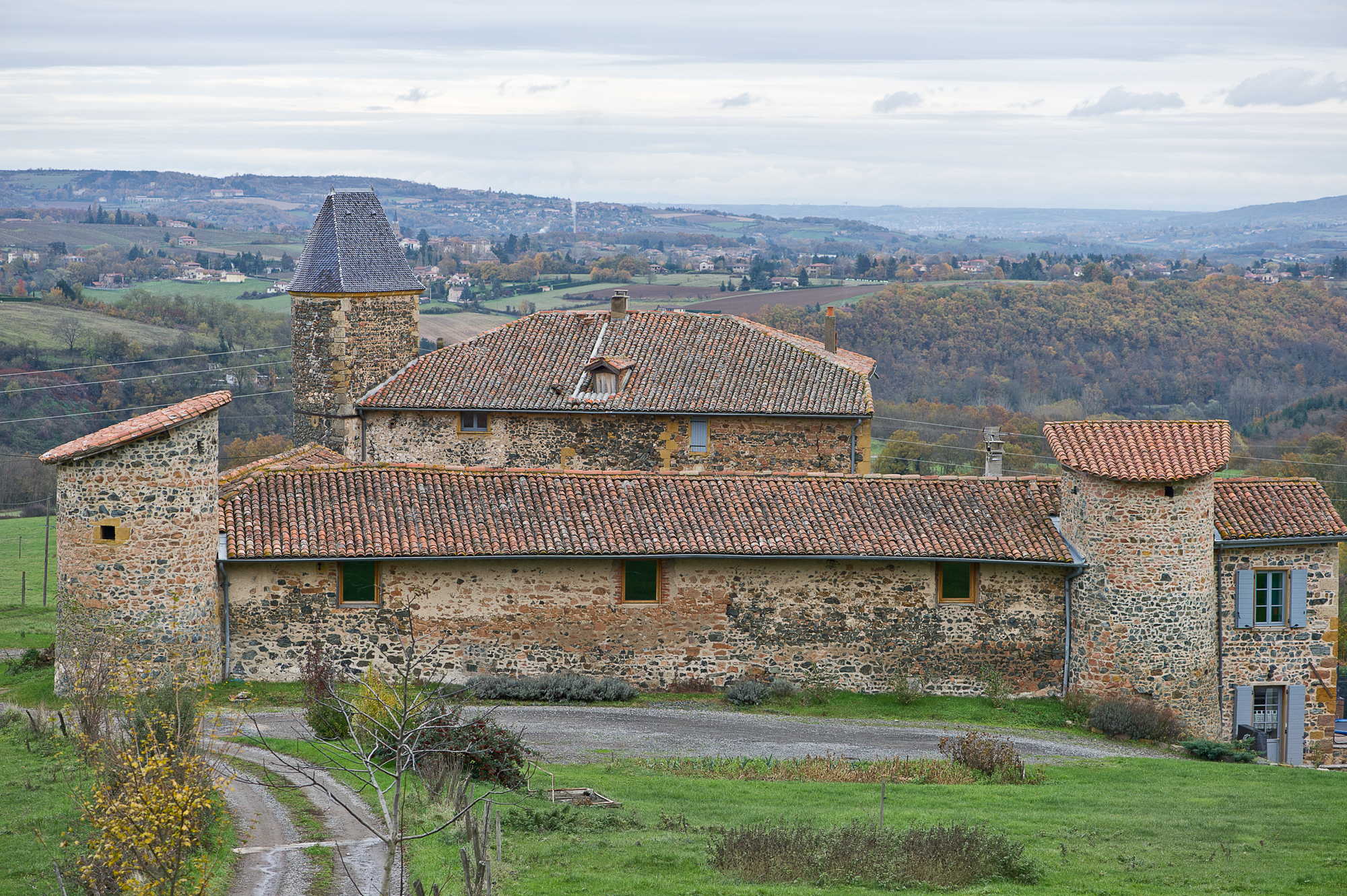 Maison forte du Péage, Le Péage (Inscrit, 1997) .